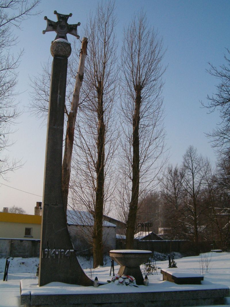 Polska, woj. wielkopolskie, Dobrzyca, Pomnik poległym w walce o niepodległość i obronę ojczyzny u zbiegu ulic Koźmińskiej i Parkowej.